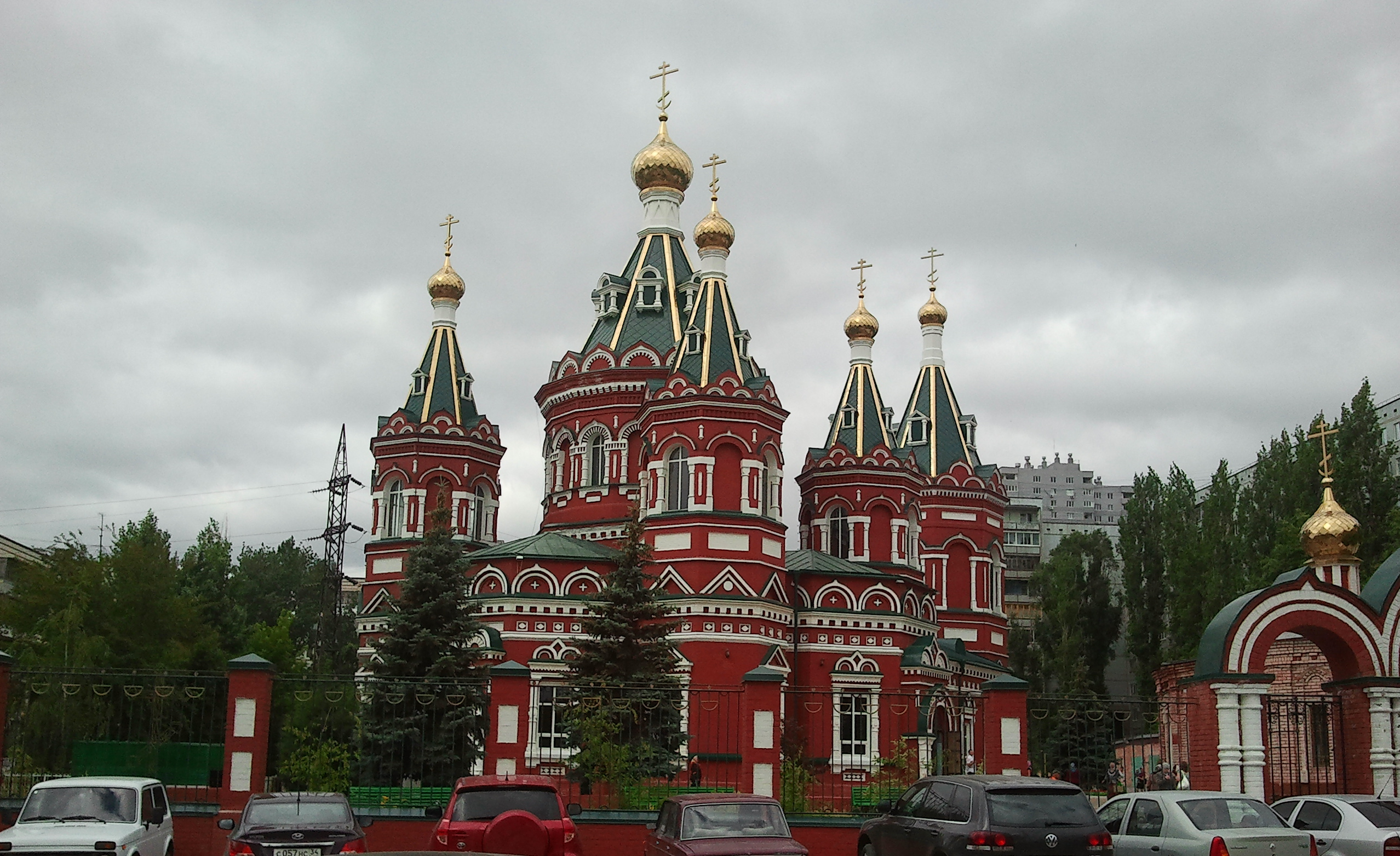 Казанский собор (Волгоградская область, Волгоград, кузнецкая улица)